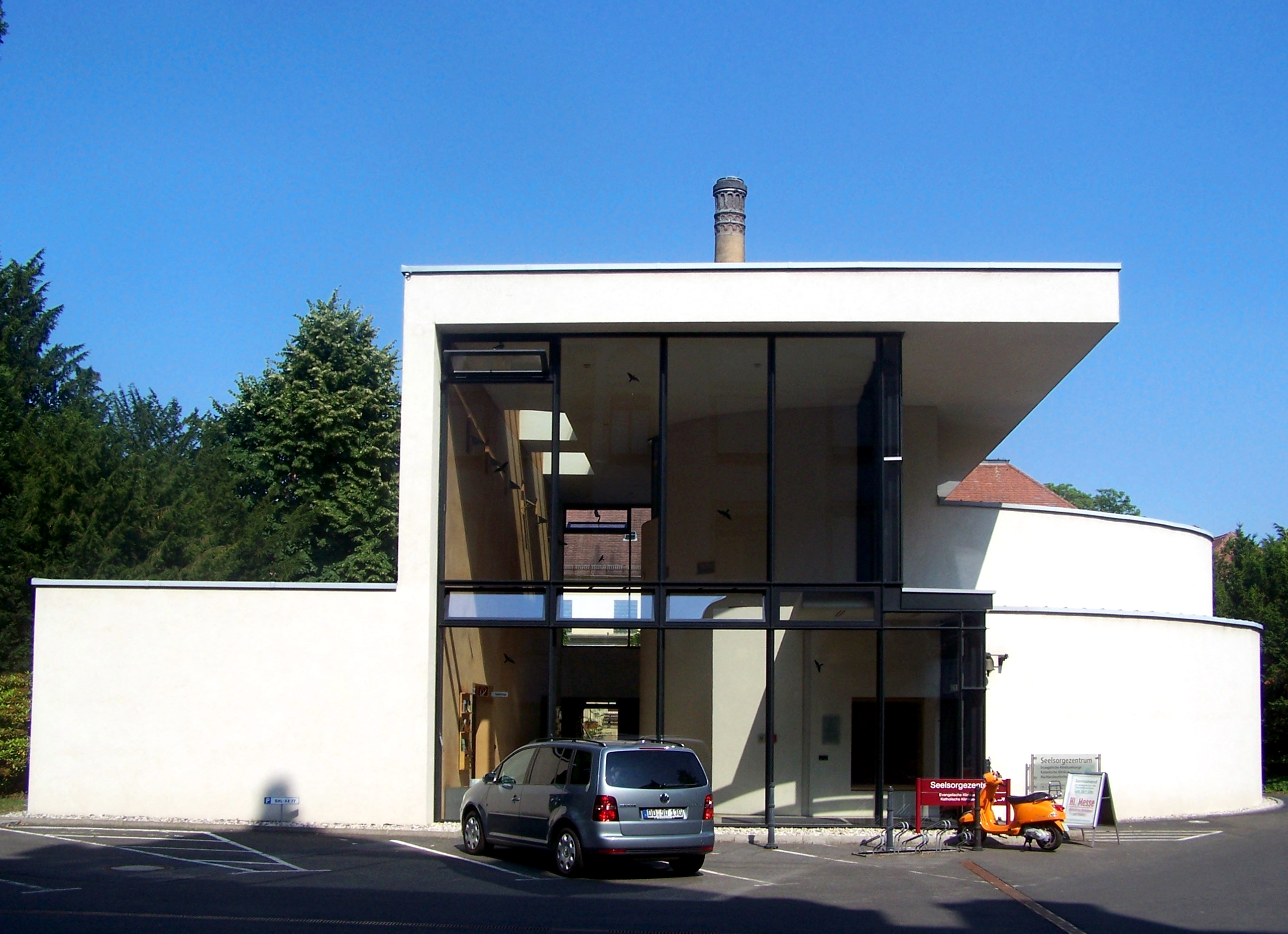 Ökumenisches Seelsorgezentrum der Dresdner Uniklinik